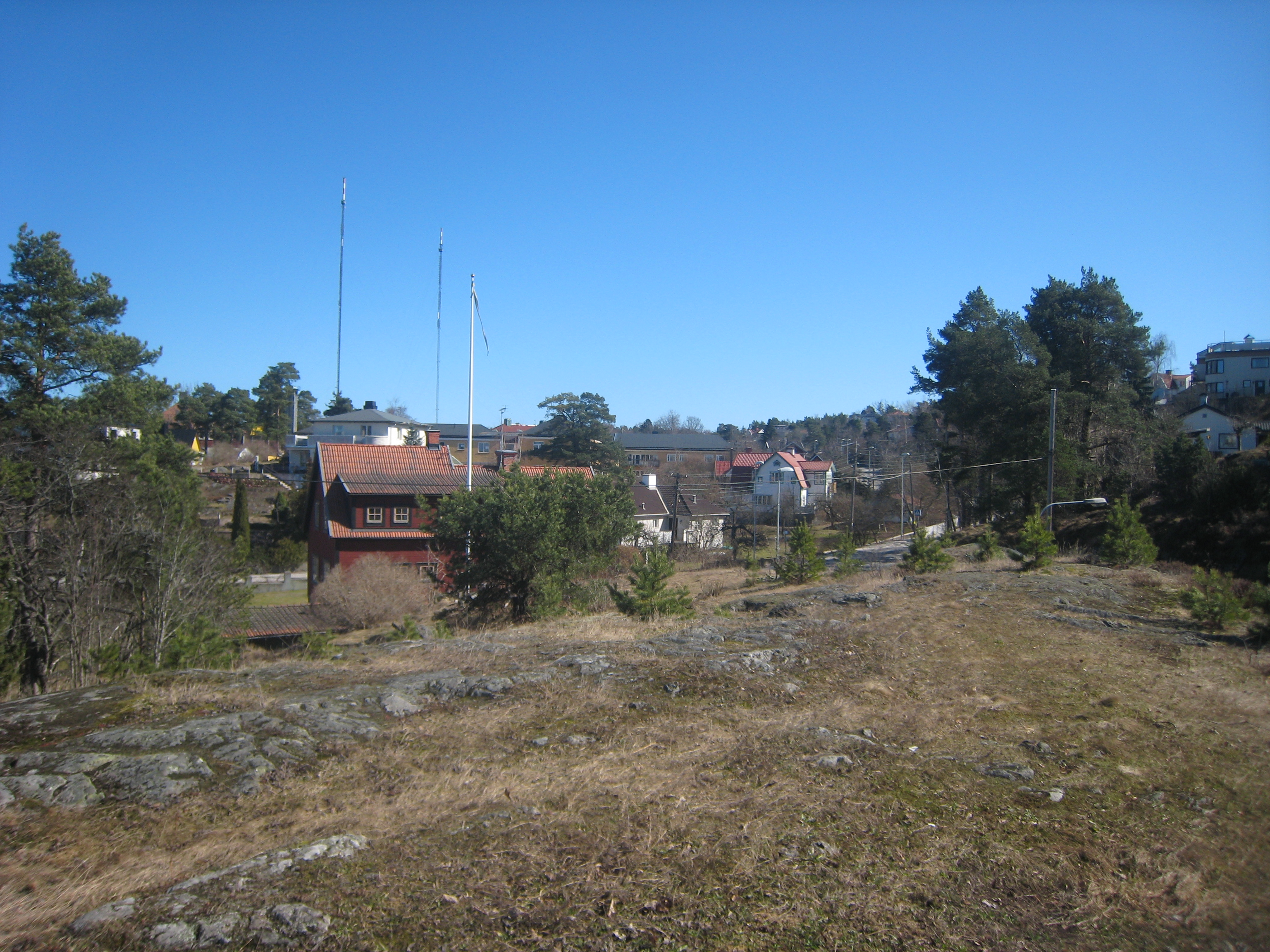 Hästhagen